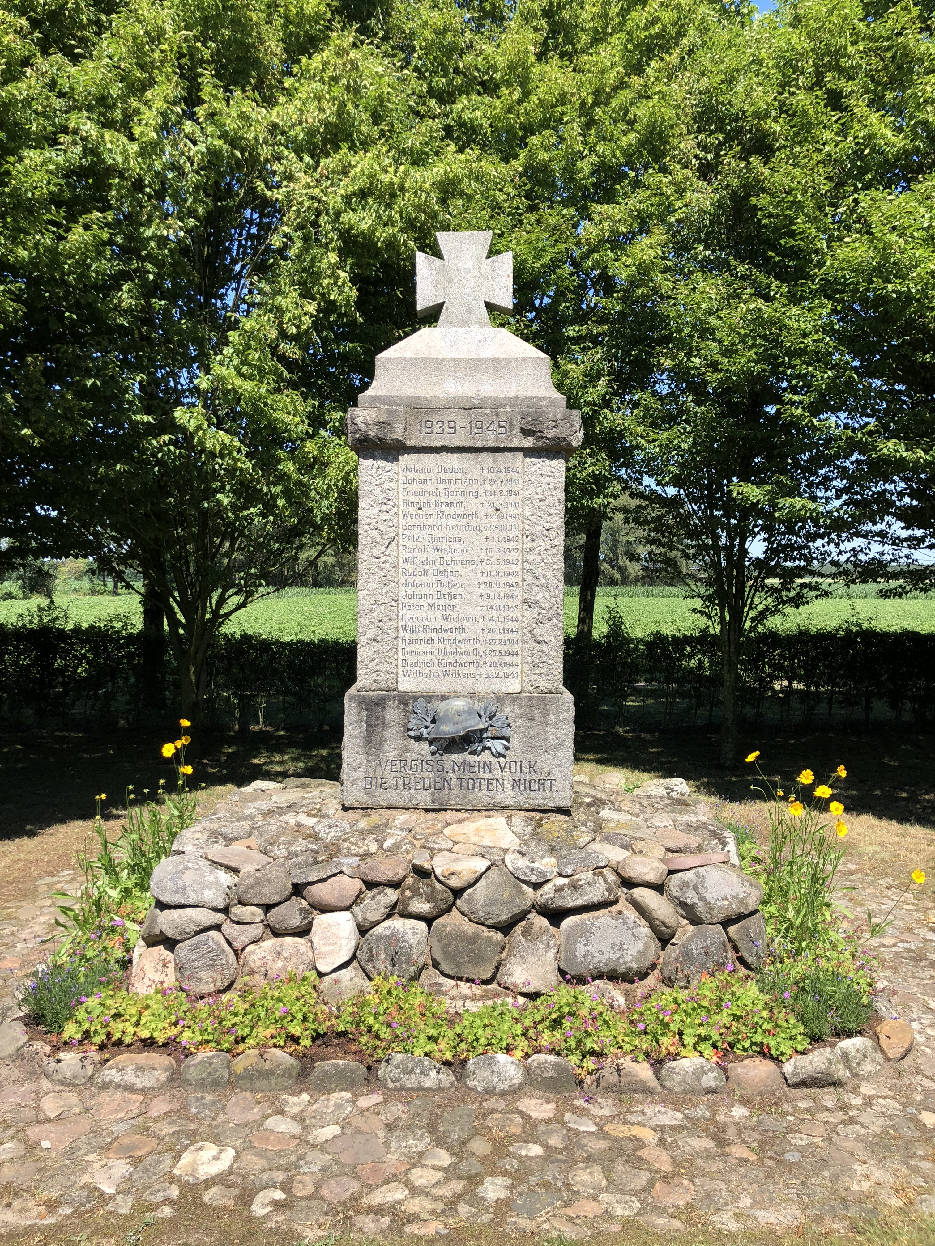 Kriegerdenkmaal op’n Karkhoff in Woonst